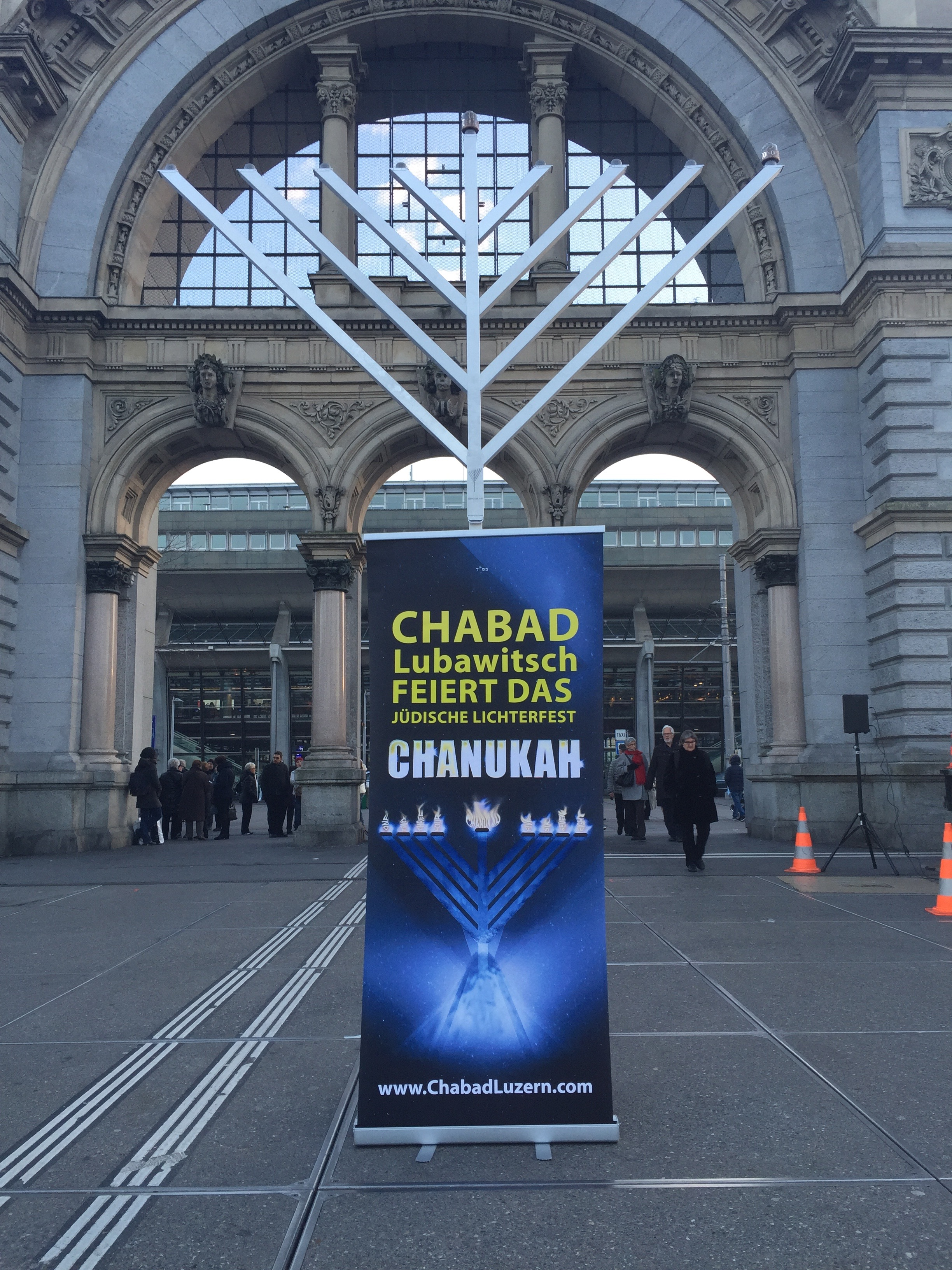 הדלקת מנורת חנוכה במרכז העיר לוצרן